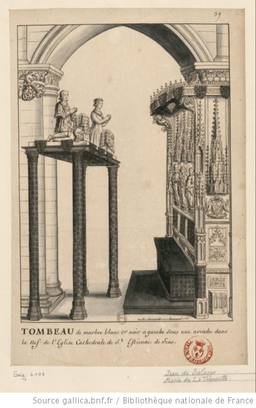 dessin relevé pour gaignières, conservé à la BNF et numérisé par Gallica.